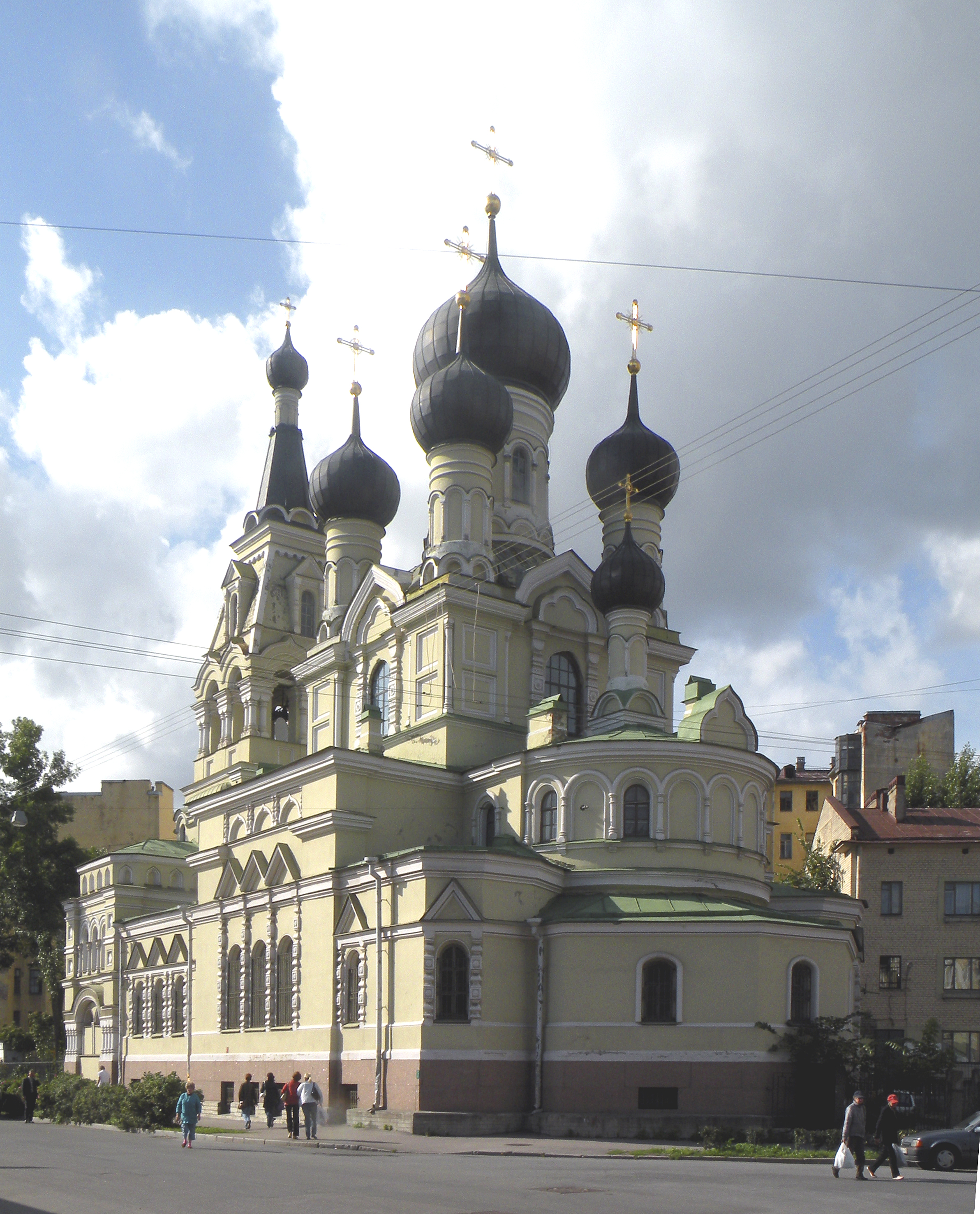 Церковь во имя Шестаковской (Шелтомежской) иконы Божией Матери Грузинского прихода. Санкт-Петербург, Старорусская ул., д. 8/2. [1]